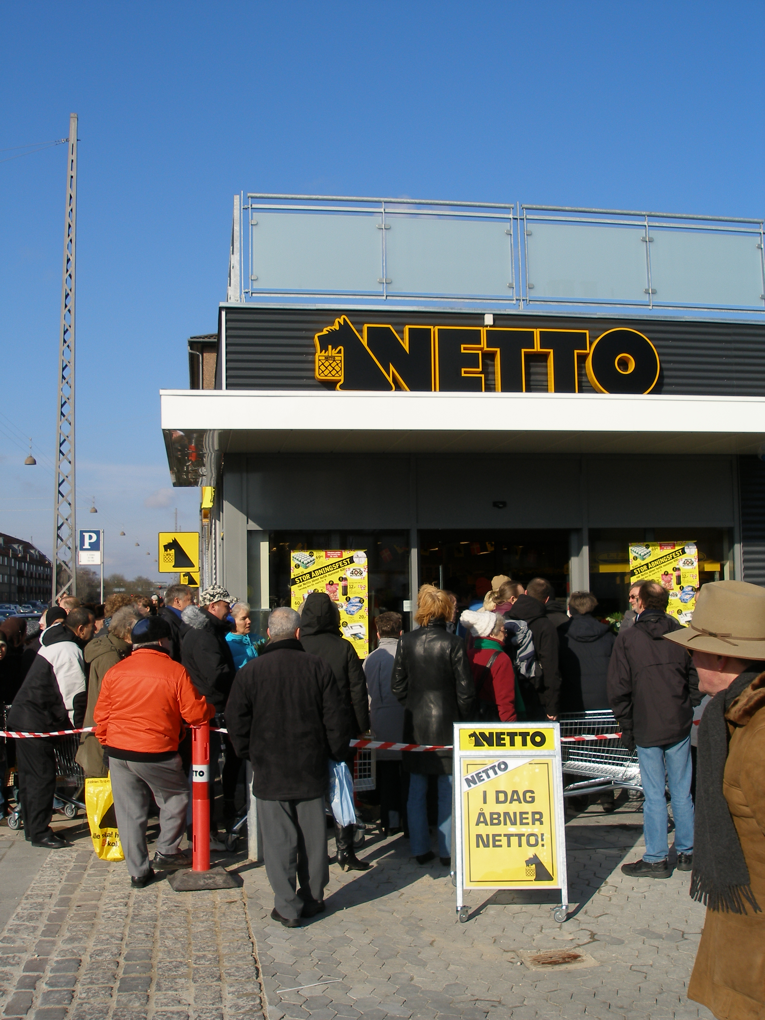 Trængsel ved indgangen ved åbningen af Netto på Roskildevej 158-162 d. 26. marts 2009.